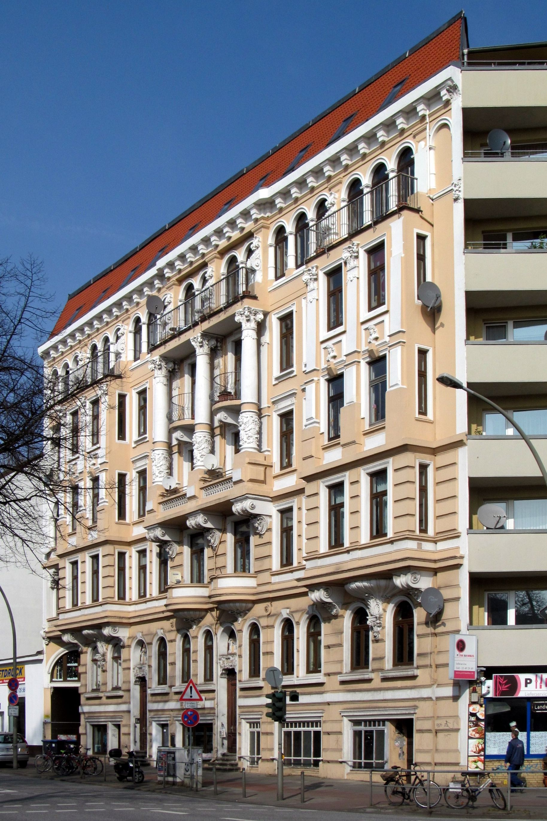 Denkmalgeschütztes Wohn- und Geschäftshaus Landwehr 35 in Hamburg-Eilbek This is a photograph of an architectural monument.